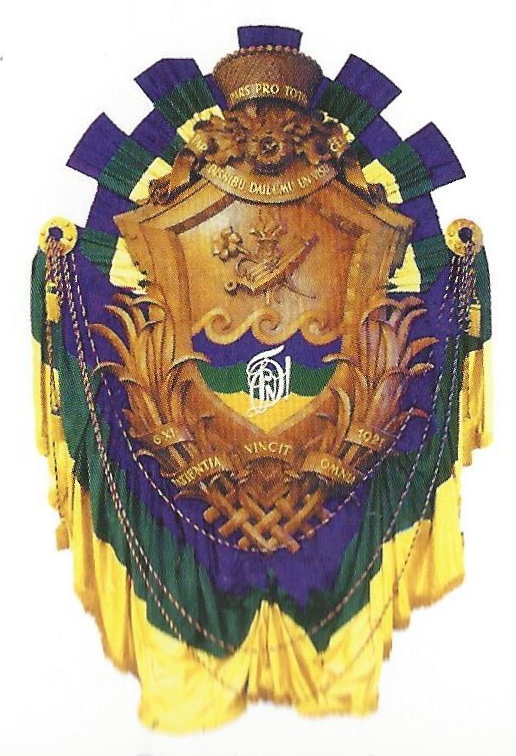 Studentenwappen der lettischen Damenverbindung Daugaviete